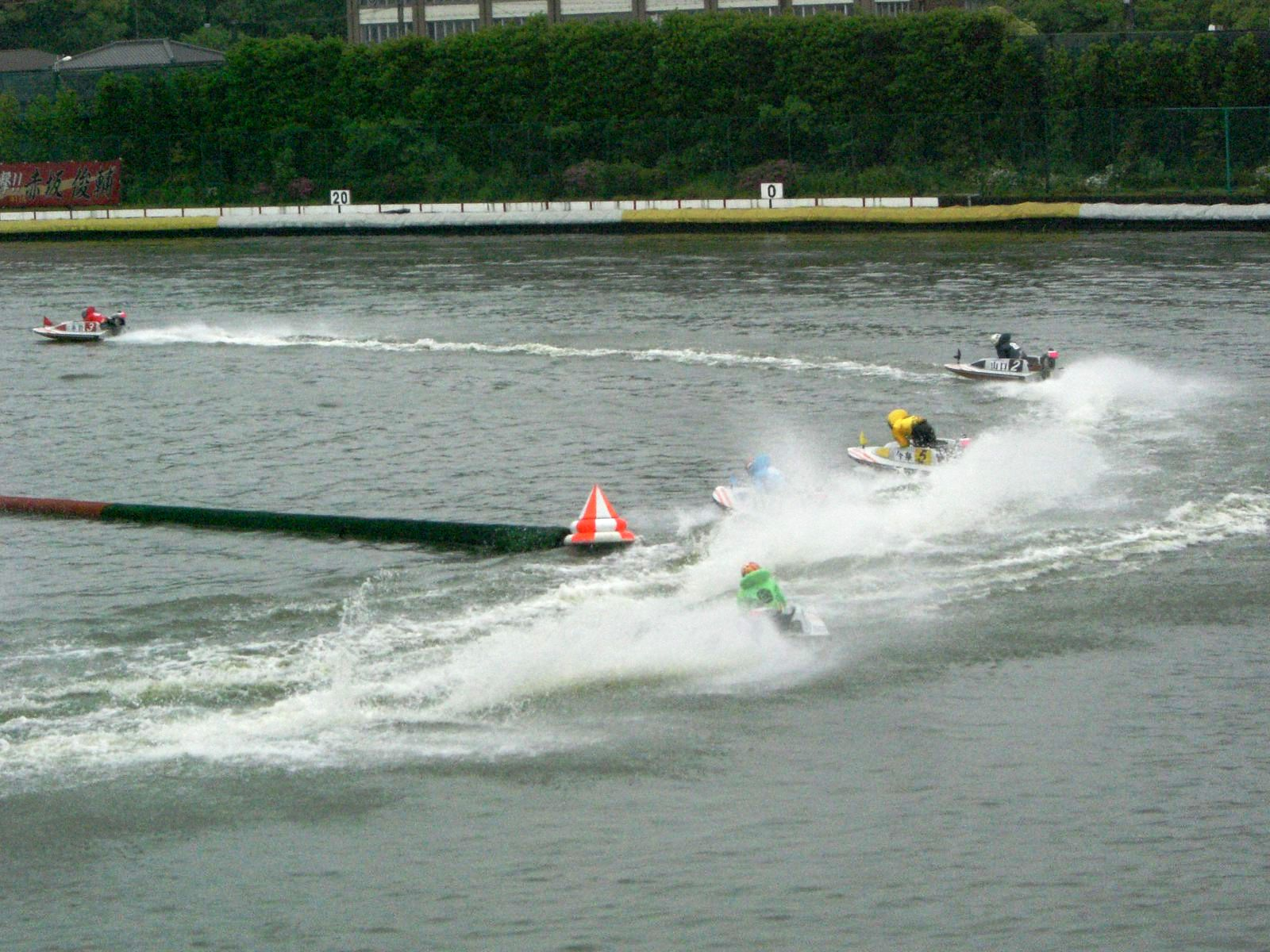 KYOTEI at Suminoe OSAKA